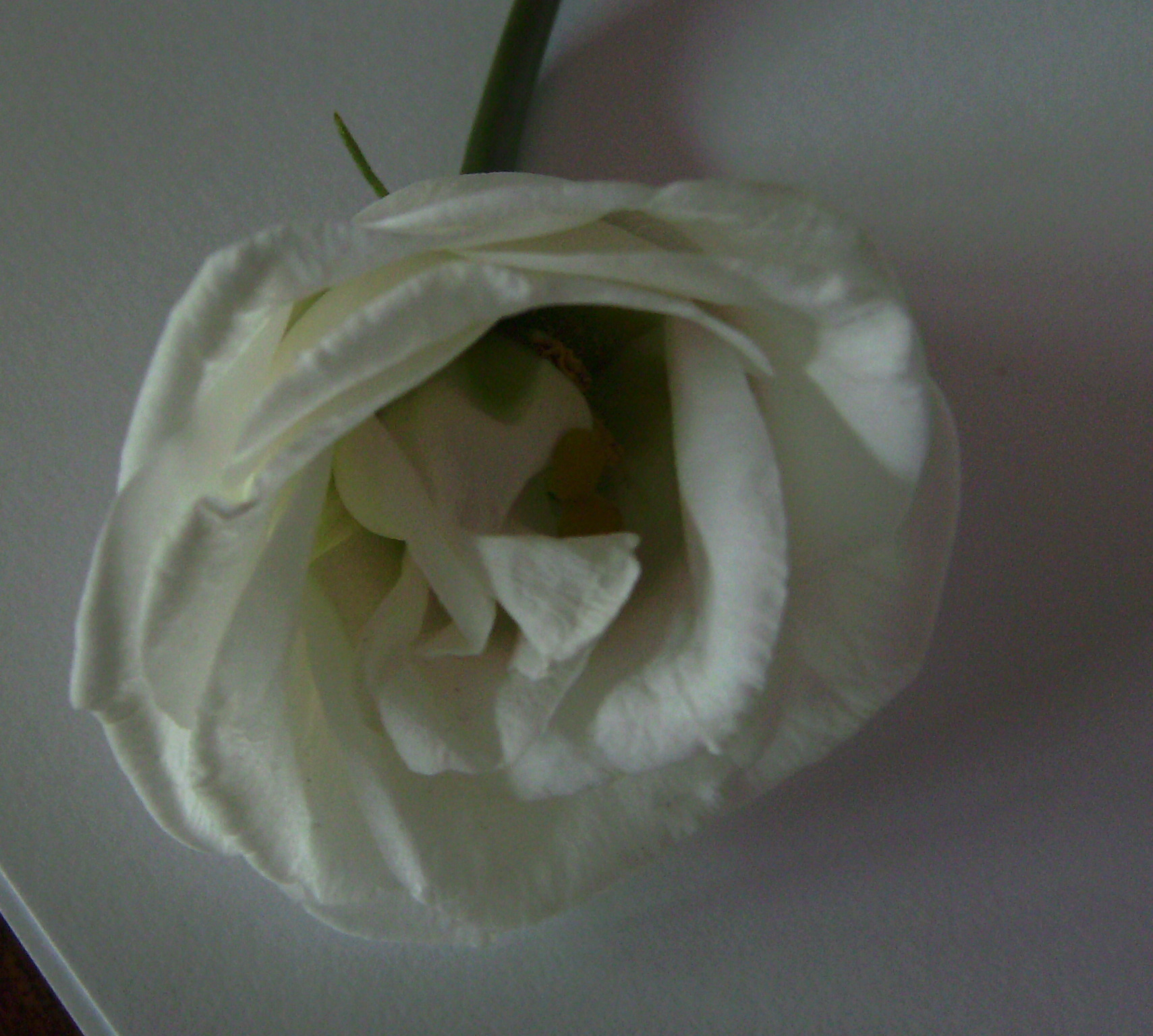 Flor d'Eustoma russellianum de front GRIN link : Eustoma russellianum (Hook.) G. Don (Syn. Eustoma exaltatum ssp. russellianum (Hook.) Kartesz) Considered a synonym ITIS link: Eustoma russellianum (Hook.) G. Don (Syn. Eustoma exaltatum ssp. russellianum (Hook.) Kartesz) Invalid (mirror) ITIS link: Eustoma exaltatum ssp. russellianum (Hook.) Kartesz (mirror) NCBI link: Eustoma exaltatum subsp. russellianum The Plant List link: Eustoma russellianum G.Don (Syn. Eustoma grandiflorum (Raf.) Shinners) Considered a synonym (Source: KewGarden WCSP) The Plant List link: Eustoma grandiflorum (Raf.) Shinners (Source: KewGarden WCSP) Tropicos link: Eustoma russellianum (Hook.) G. Don (Syn. Eustoma grandiflorum (Raf.) Shinners) (+ sub-taxa)